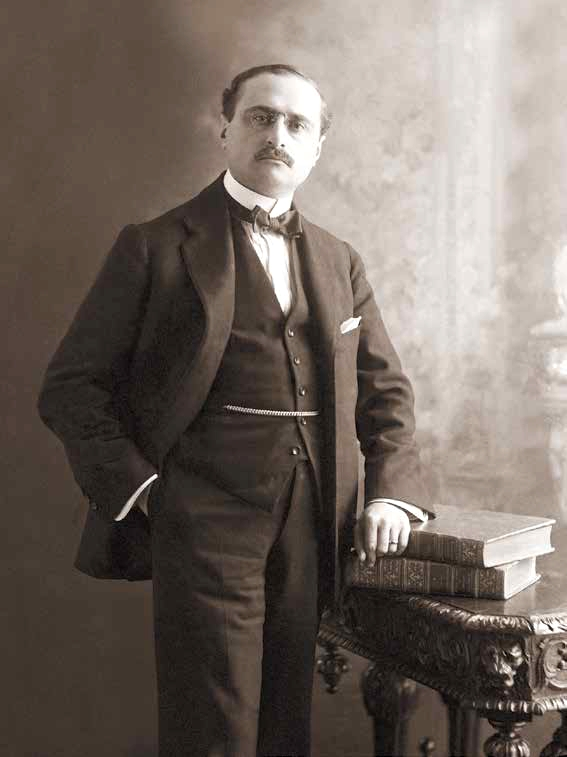 Francisco Tudela y Varela, diplomático y abogado, ministro de Hacienda del Perú en 1913, ministro de Relaciones Exteriores del Perú en 1914 y 1917-1918, Presidente del Consejo de Ministros de 1917 a 1918.